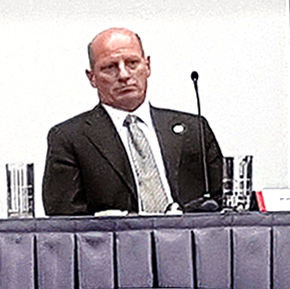 Séance du Conseil d'arrondissement de Ville-Marie du 13 septembre 2016. Jean-Marc Gibeau, conseiller de la Ville délégué ; Ville-Marie borough council meeting, 13 September 2016. Jean-Marc Gibeau, city councilor appointed by the mayor; Montréal, Québec, Canada, 13 September 2016.